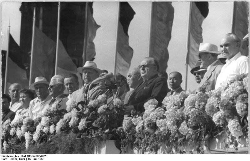 Zentralbild Ulmer 15.7.1958. Großkundgebung zum Abschluß des V. Parteitages der SED in Berlin. Zum Abschluß des V. Parteitages der SED fand am 16.7.1958 auf dem Marx-Engels-Platz in Berlin eine machtvolle Kundgebung der Bevölkerung der deutschen Hauptstadt statt. Die Werktätigen Berlins ereinten sich mit den Delegierten des Parteitages, dem neugewählten Zentralkomitee der SED und den Abgesandten von 48 Kommunistischen- und Arbeiterparteien aus aller Welt in einem eindruckvollen Bekenntnis zu Frieden, Demokratie und Sozialismus. UBz.: Block auf die Ehrentribüne während der Eröffnungsansprache des ERsten Sekretär der Bezirksleitung Groß-Berlin der SED Hans Kiefert. (Rechts): Heinrich Rau, Mitglied des Politbüros des ZK der SED, Ministerpräsident Otto Grotewohl; und (von links nach rechts): Max Reimann, Erster Sekretär des ZK der KPD; Hermann Matern, Mitglied des Politbüros des ZK der SED; Etienne Fajon, Mitglied des Politbüros des ZK der KP Frankreichs; Walter Ulbricht, Erster Sekretär ds ZK der SED; und Dung Bi-wu, Mitglied des Politbüros des ZK der KP Chinas.